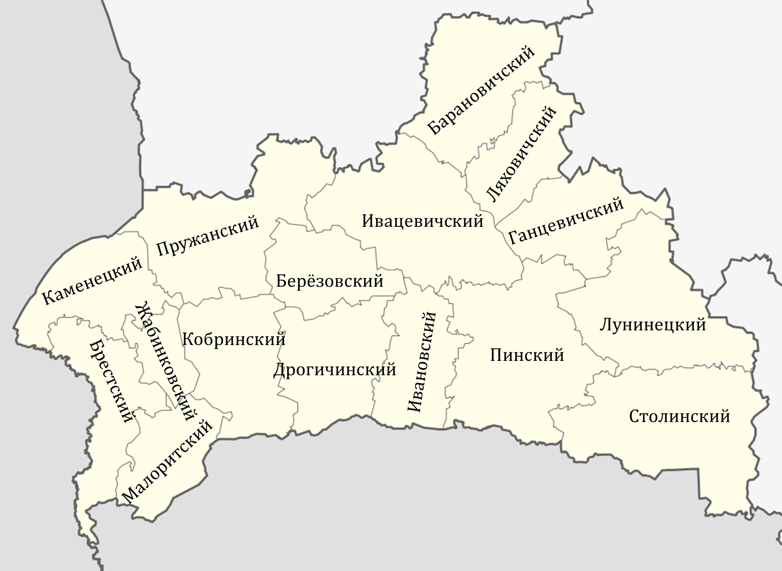 Административно-территориальное деление Брестской области